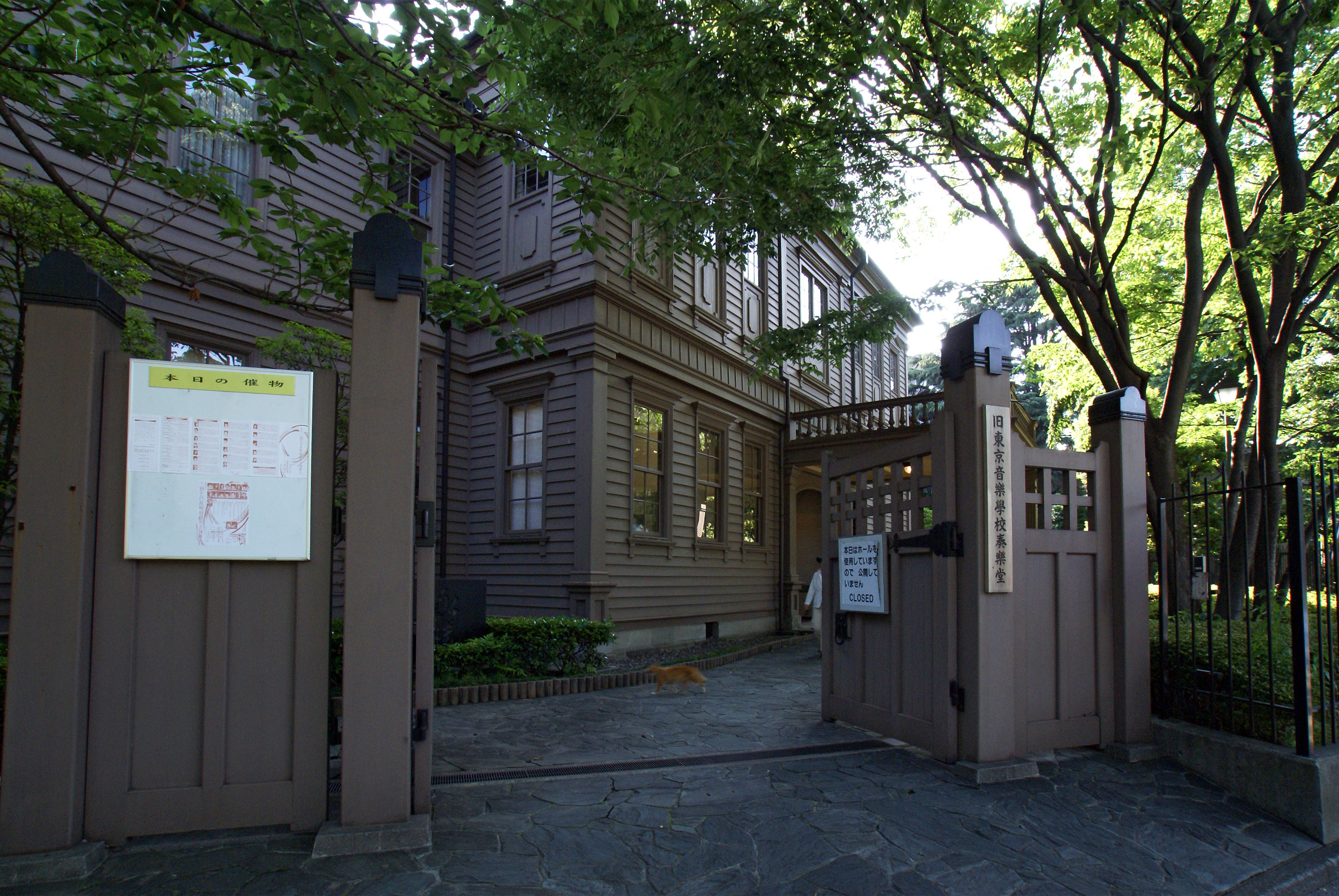 Sogakudo, Taito-ku, Tokyo, Japan